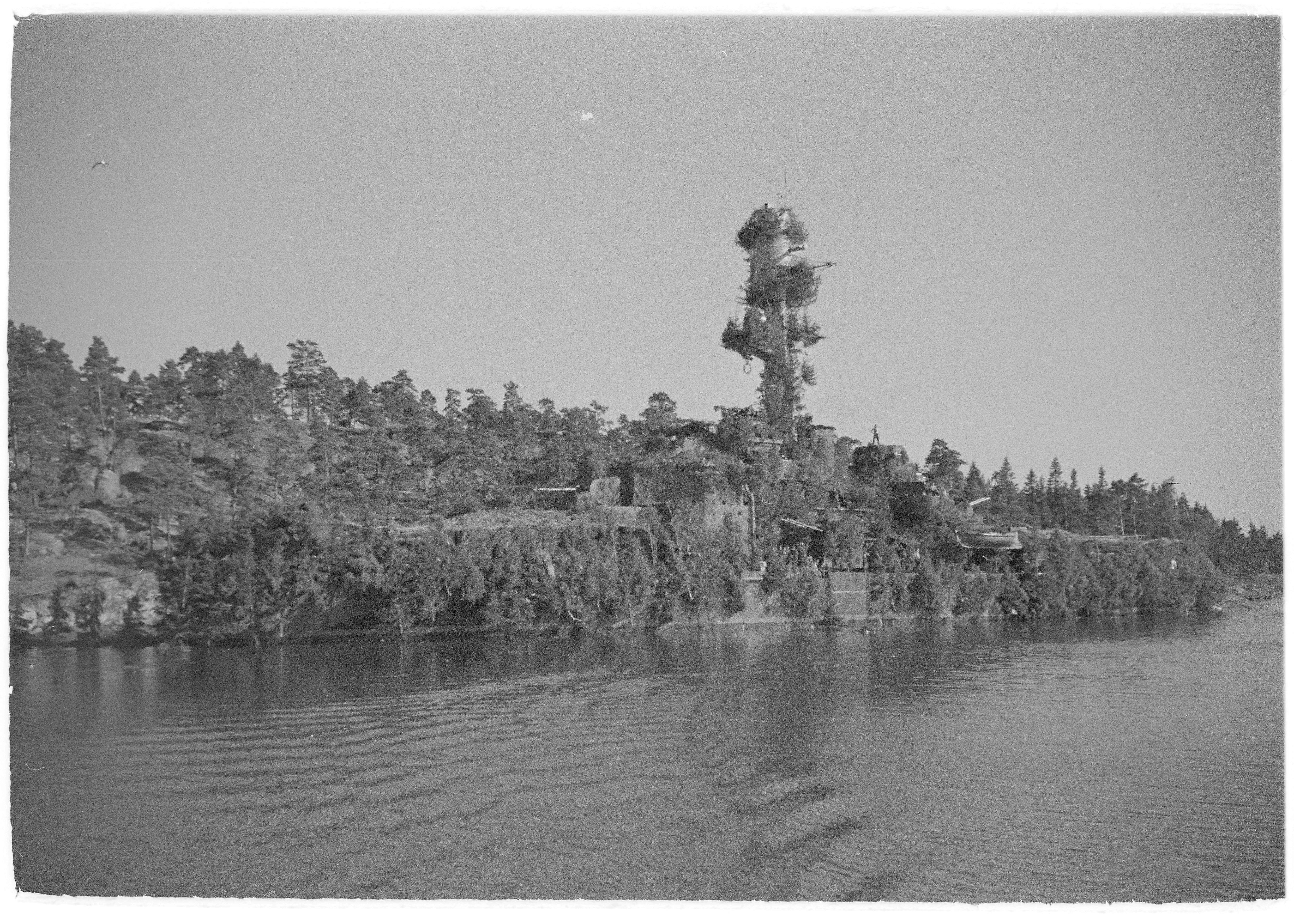 Panssarilaiva Väinämöinen naamioituna.